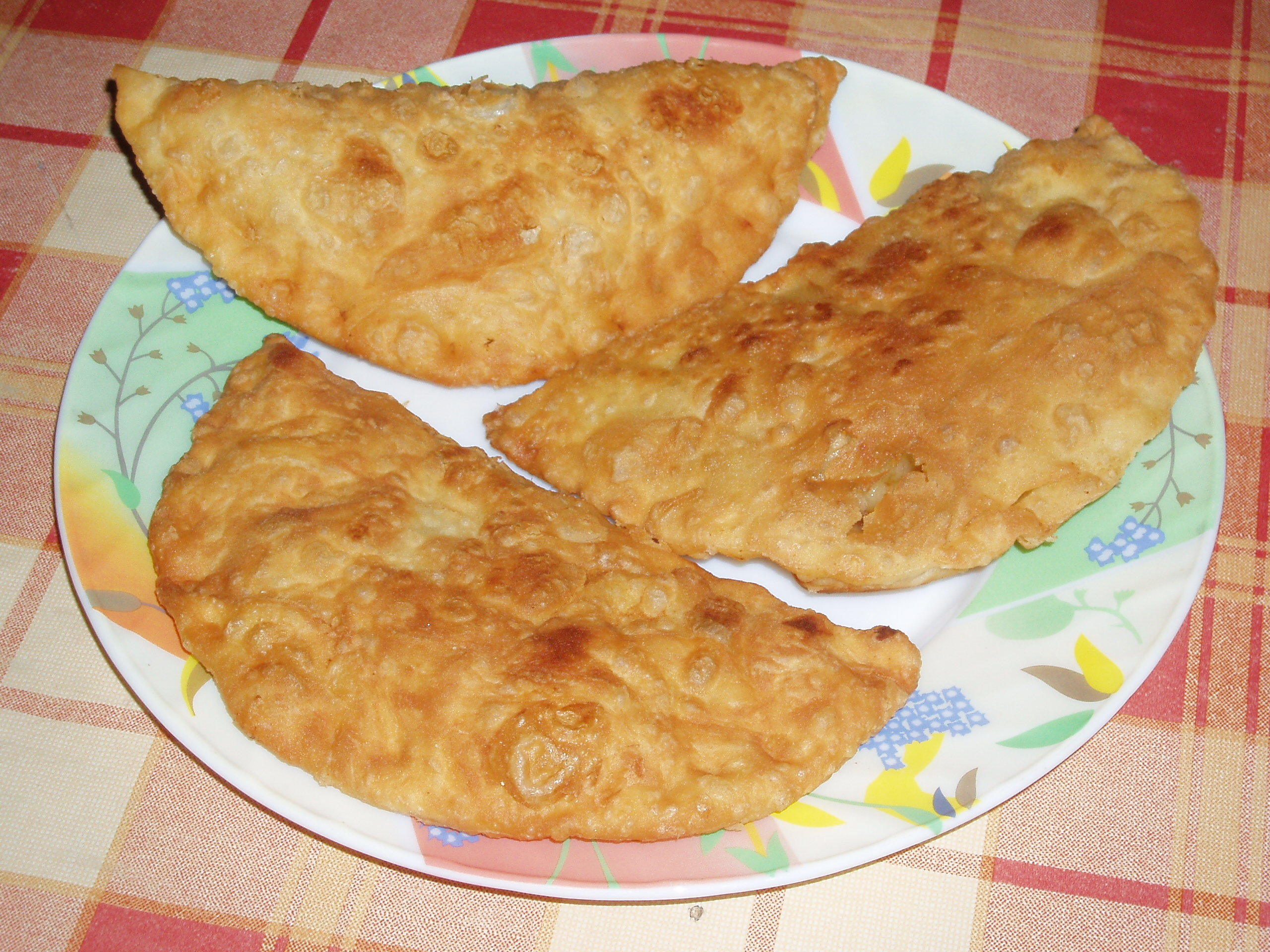 Три чебуреки